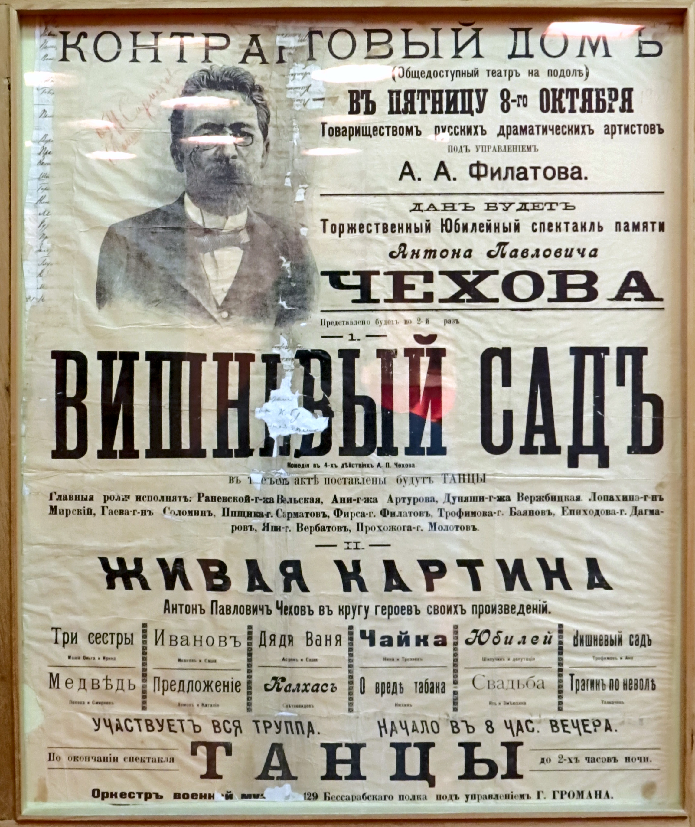 Експозиція Київського музея театрального, музичного та кіномистецтва України. Афіша вистави «Вишневий сад», Київ (1904?)